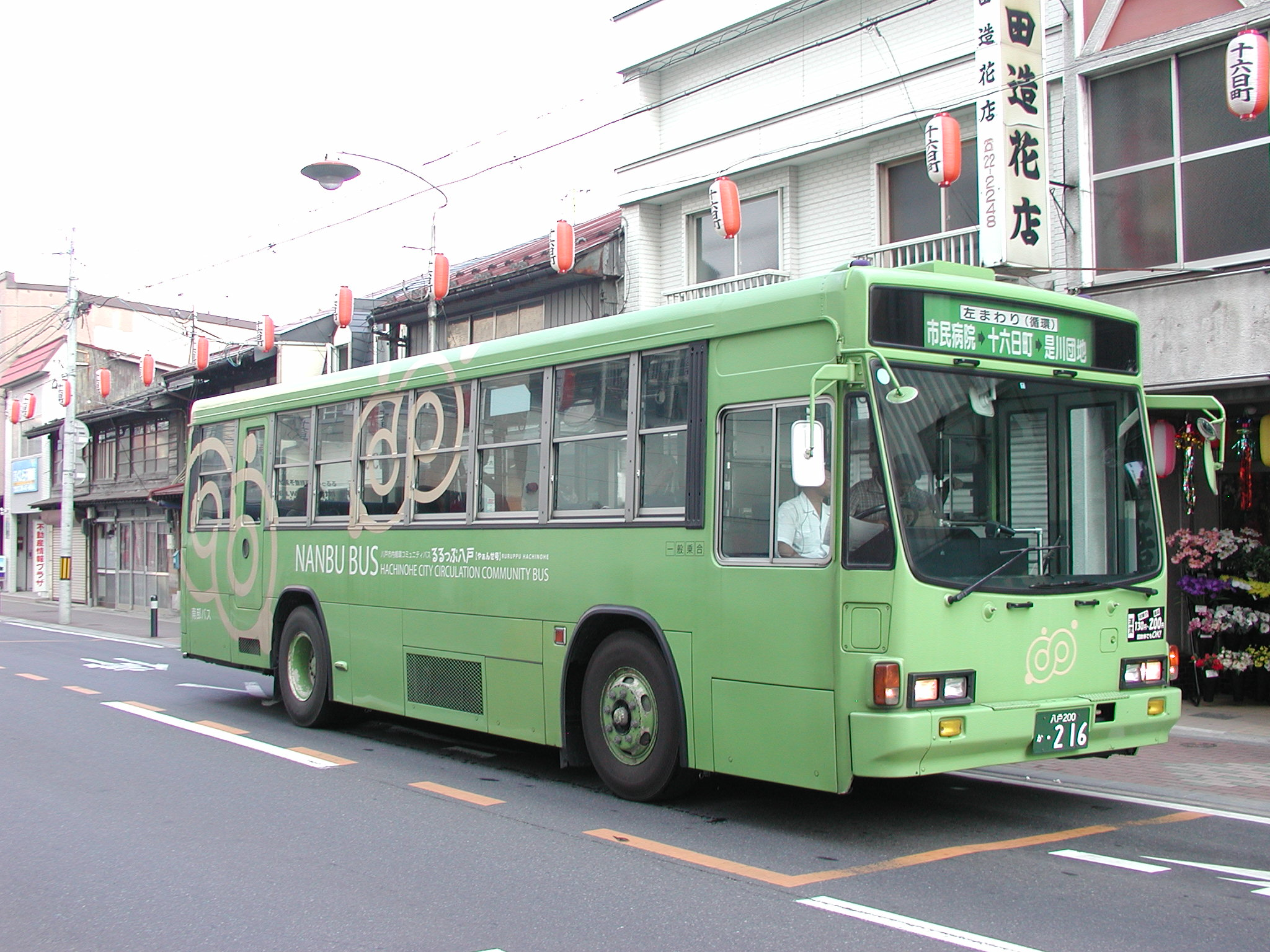 南部バス：るるっぷ八戸左まわり専用車両「やぁんせ号」（いすゞ・キュービック・U-LV324K/元：東京都交通局）十六日町バス停近くにて